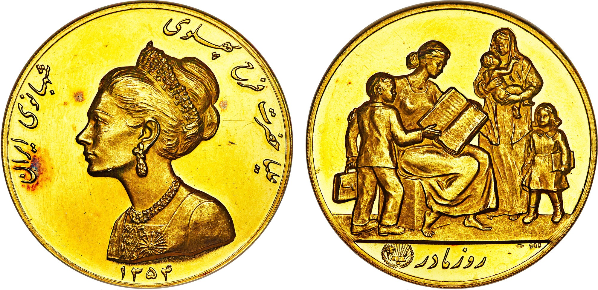 مدال یادبود روز مادر به سفارش مؤسسه اعتباری دانشگاه که آرم این مؤسسه در کنار کلمه «مادر» در پشت مدال درج شده است.